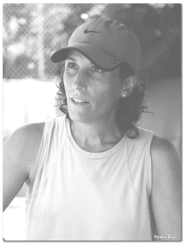 אילנה ברגר, 2008